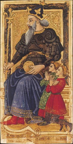 Charles VI (or Gringonneur) Deck; Le tarot dit de Charles VI